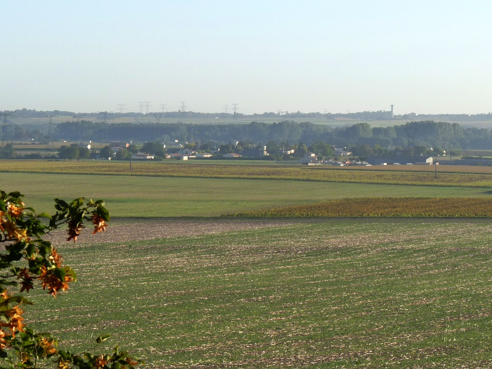 Vue vers les vallées de la Seugne et de la Charente, depuis le cimetière allemand de Berneuil, Charente-Maritime, France